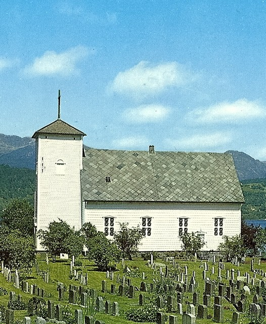 Vikøy kirke